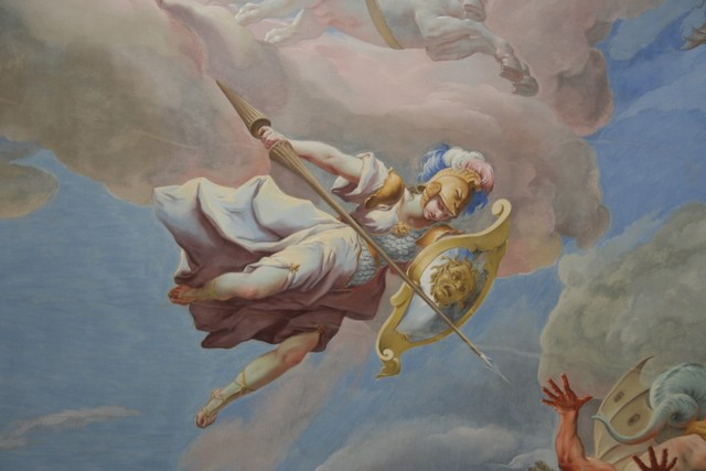 detail